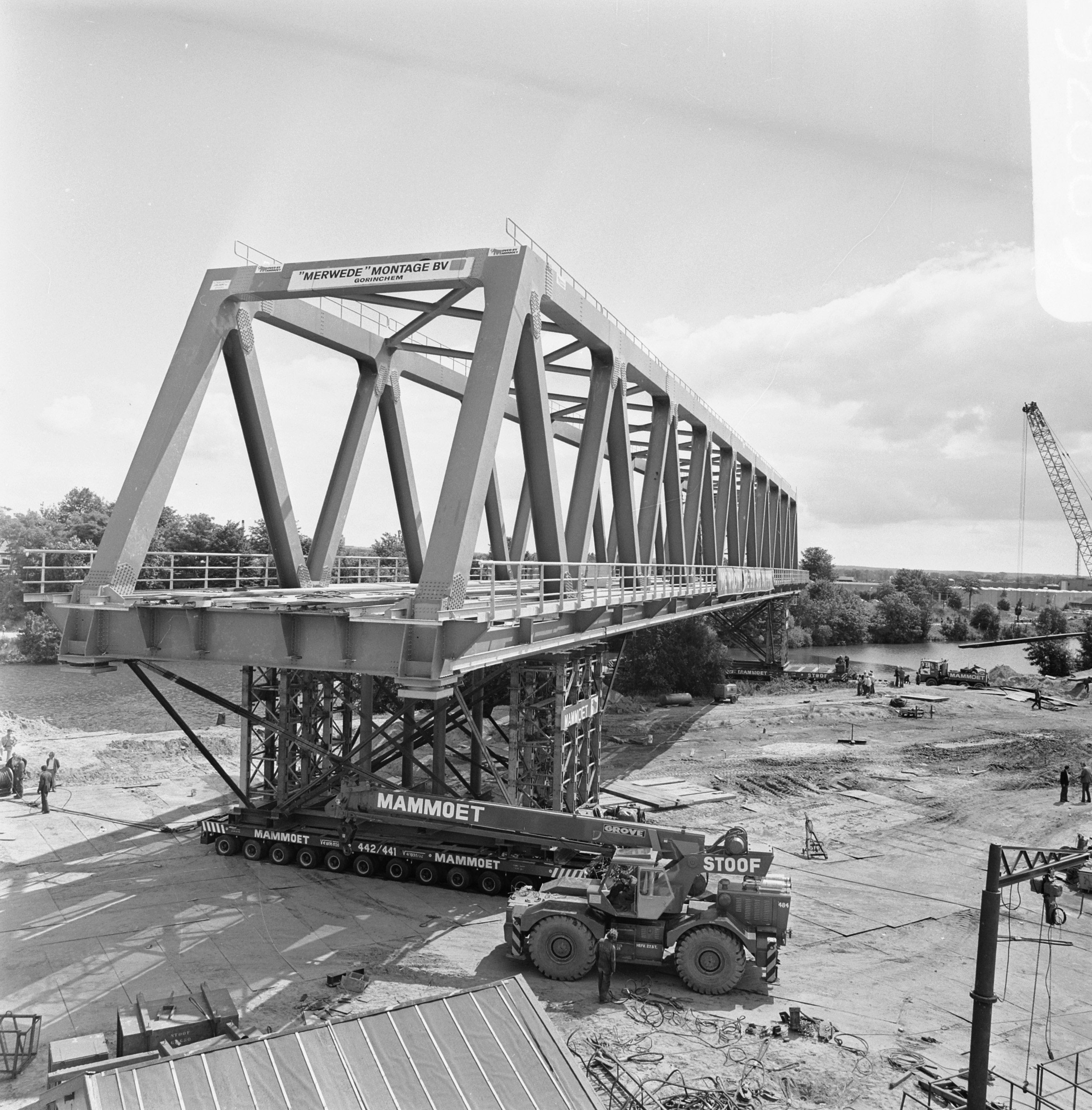 Collectie / Archief : Fotocollectie Anefo Reportage / Serie : [ onbekend ] Beschrijving : Plaatsing 110 ton zware spoorbrug over Maas Waalkanaal Datum : 31 juli 1977 Trefwoorden : bruggen Fotograaf : Croes, Rob C. / Anefo Auteursrechthebbende : Nationaal Archief Materiaalsoort : Negatief (zwart/wit) Nummer archiefinventaris : bekijk toegang 2.24.01.03 Bestanddeelnummer : 929-2885